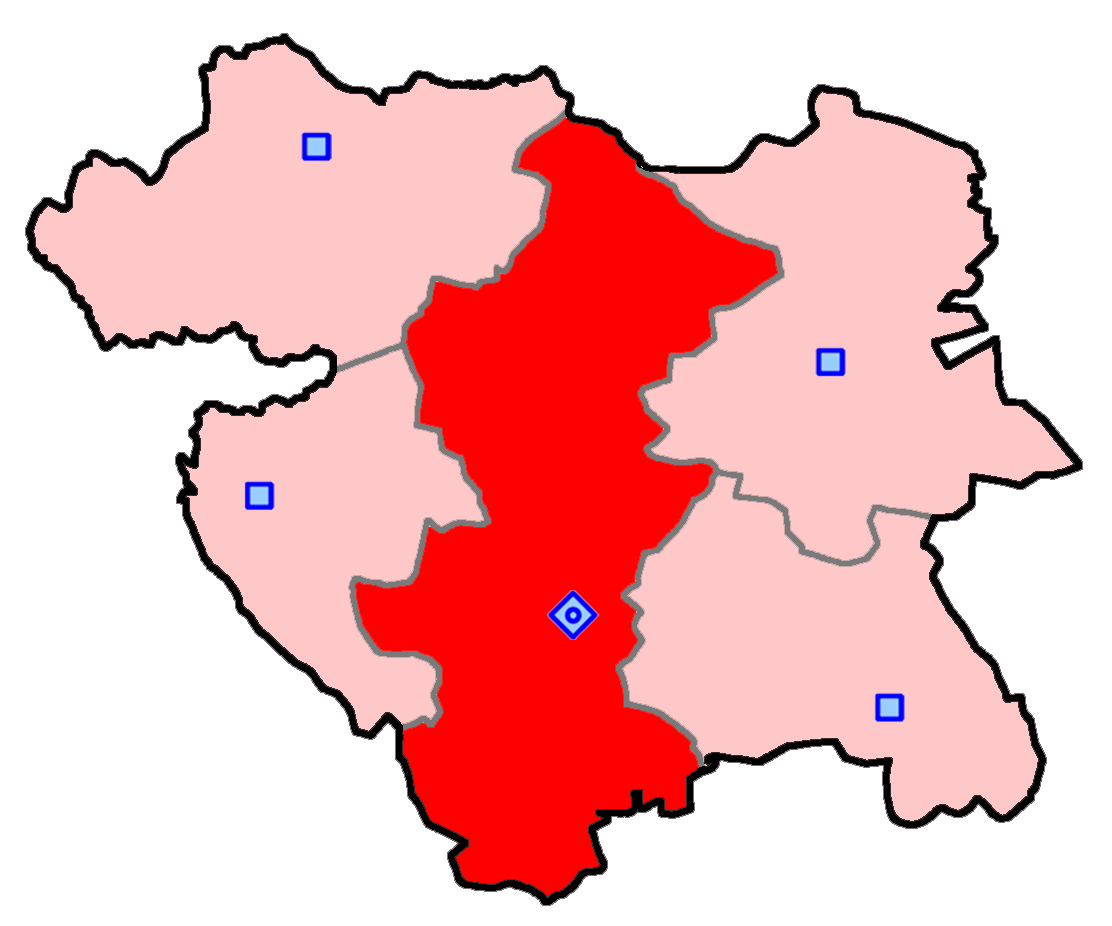 سنندج، دیواندره و کامیاران برای انتخابات مجلس شورای اسلامی